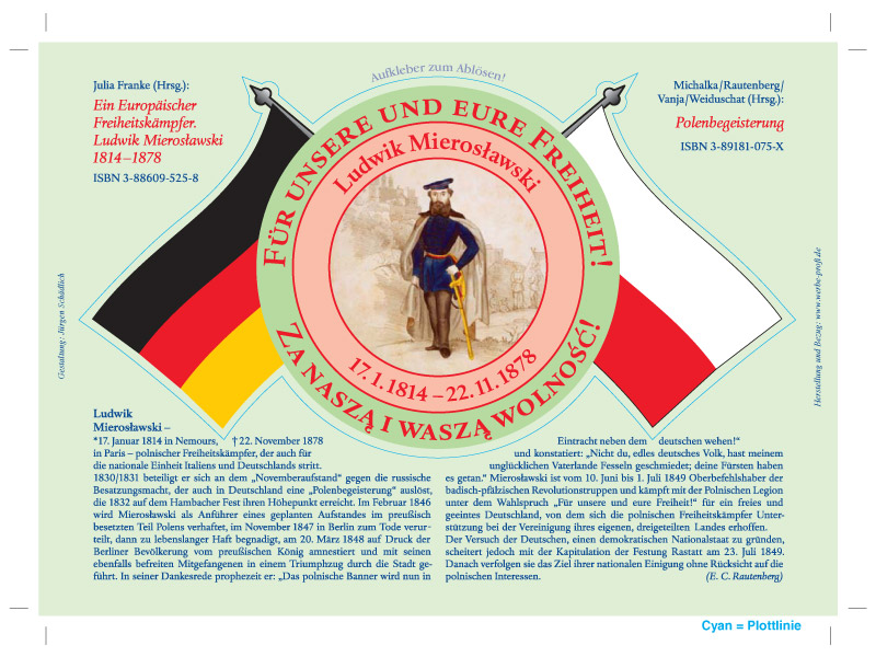 Vom brandenburgischen Generalstaatsanwalt Dr. Rautenberg 2007 in Auftrag gegebener Autoaufkleber